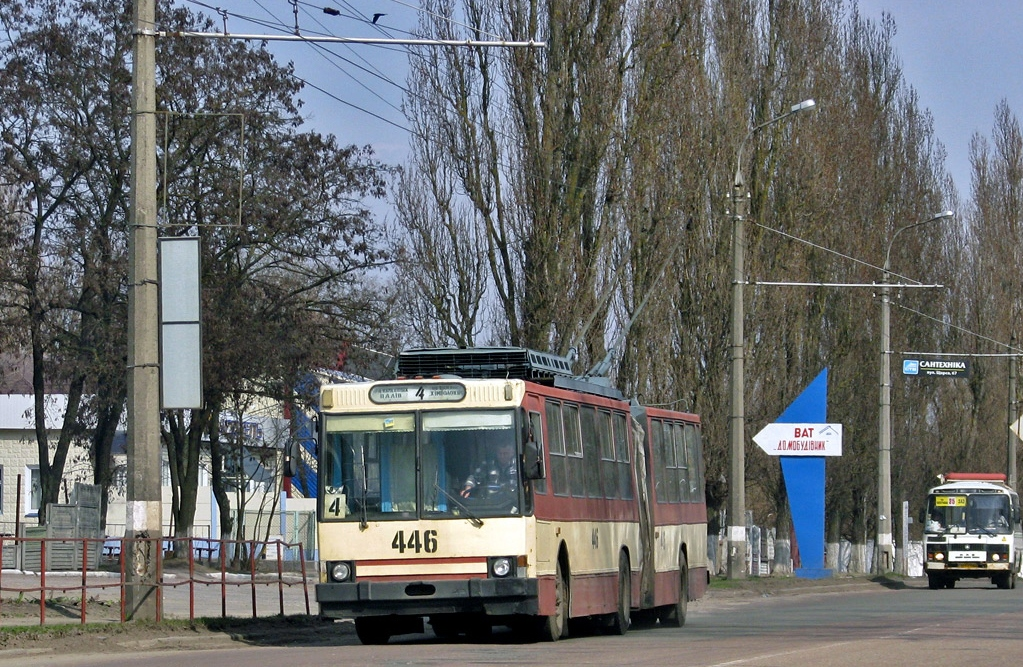 Черниговский троллейбус.